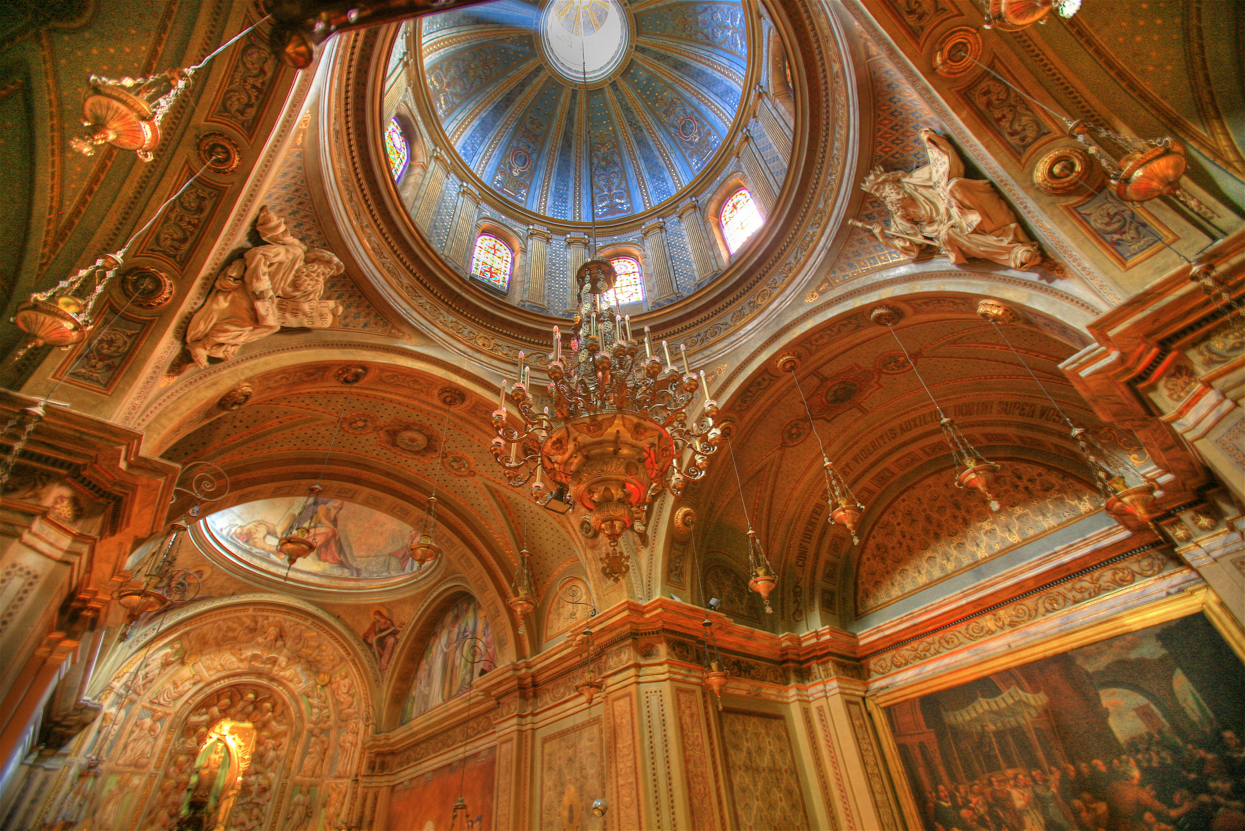 Interior de la Catedral de Santa Maria de Solsona (Catalunya).